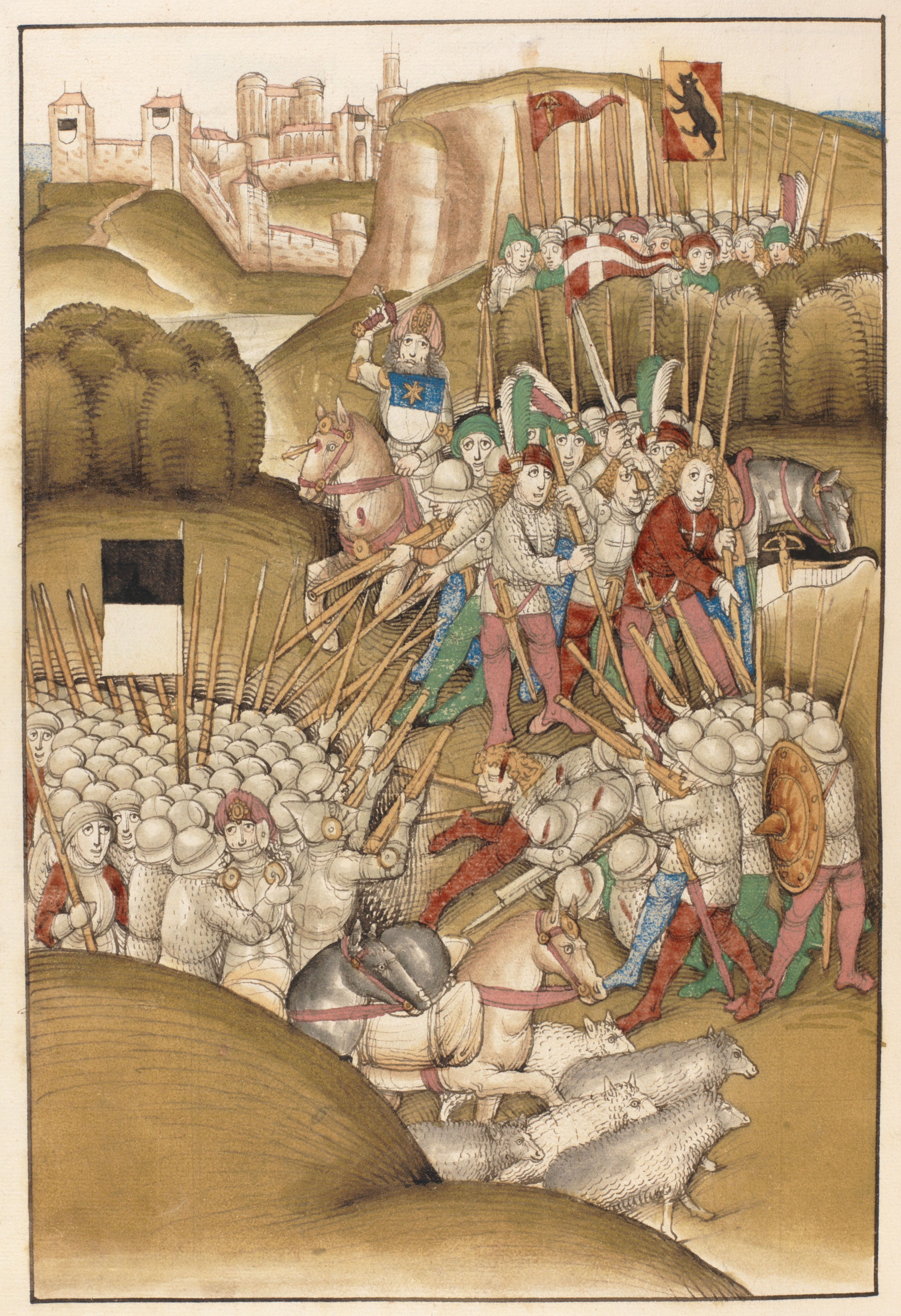 Schilling Spiezer Chronik, S. 772.